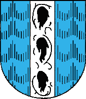 Wappen der Gemeinde Bregenz in Österreich Bregenz